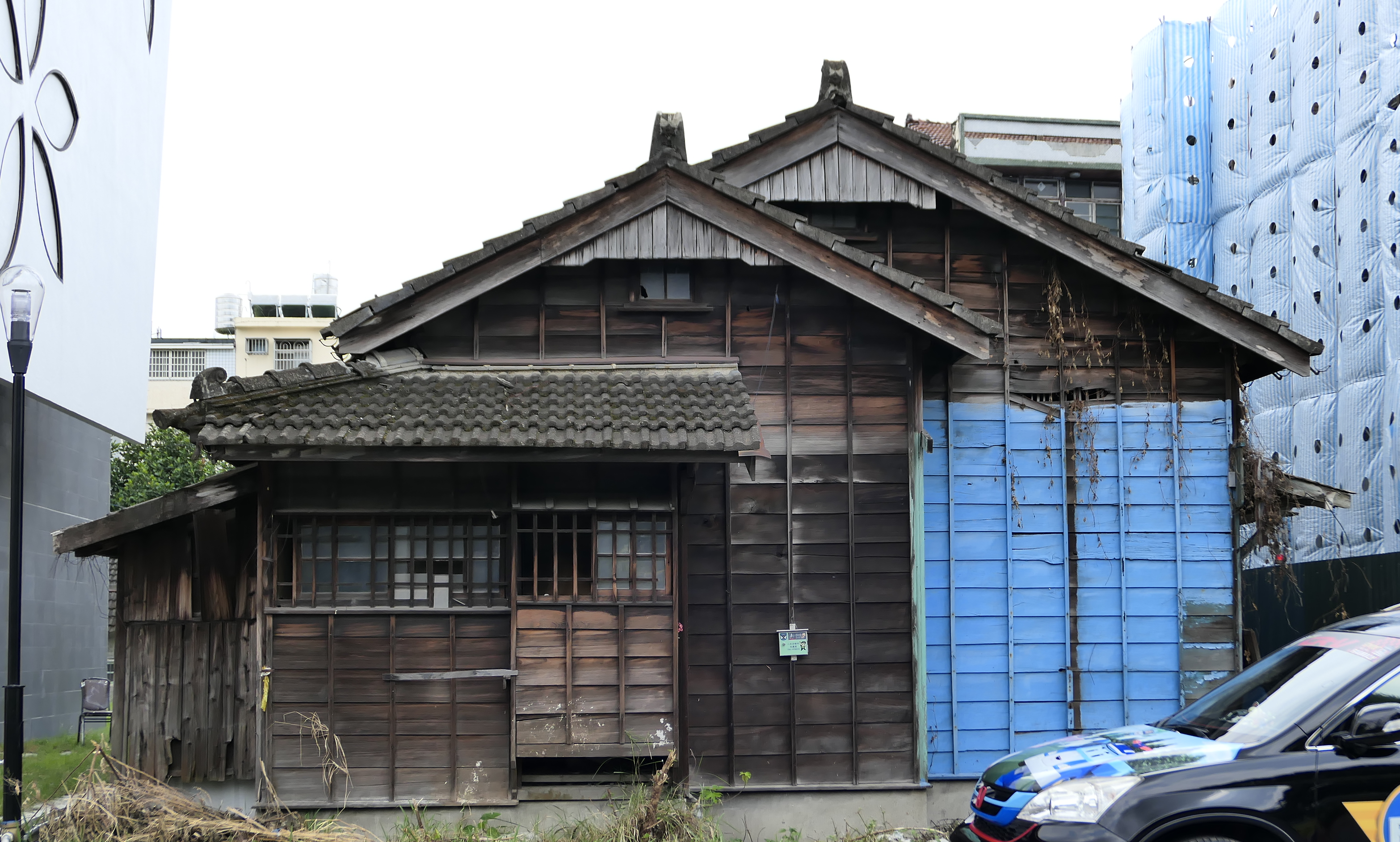 二水驛長宿舍